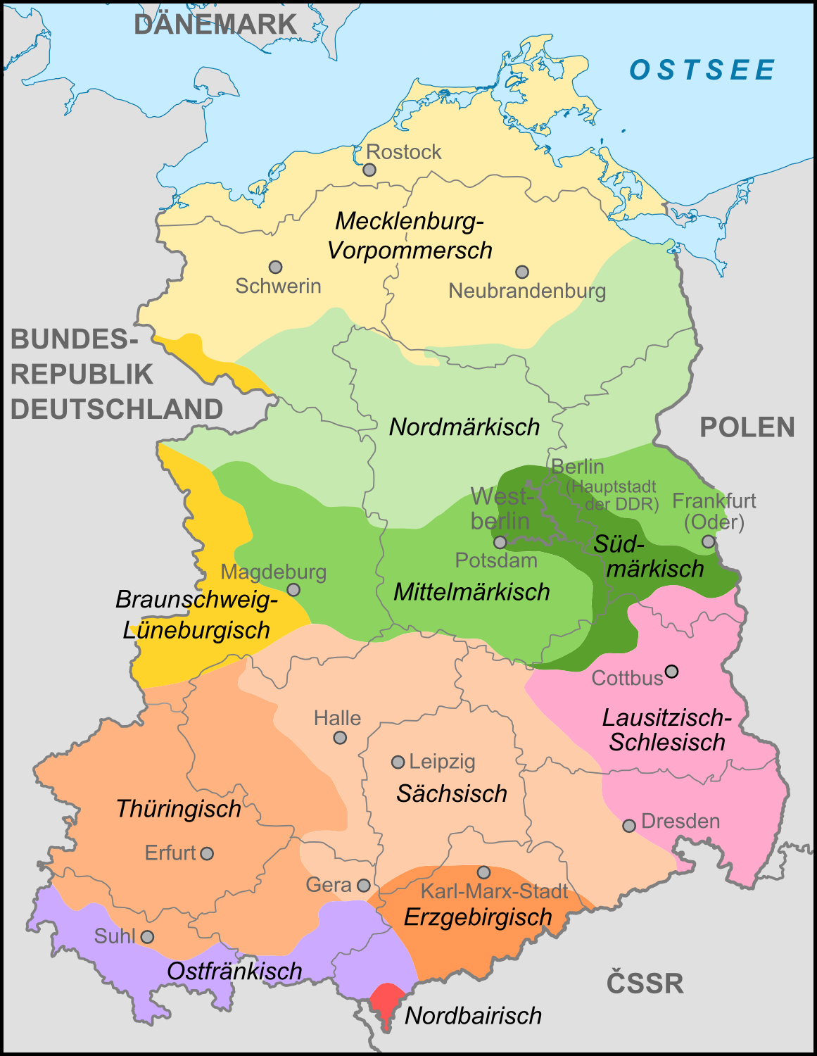 Karte der Verbreitung der Dialekte in der DDR